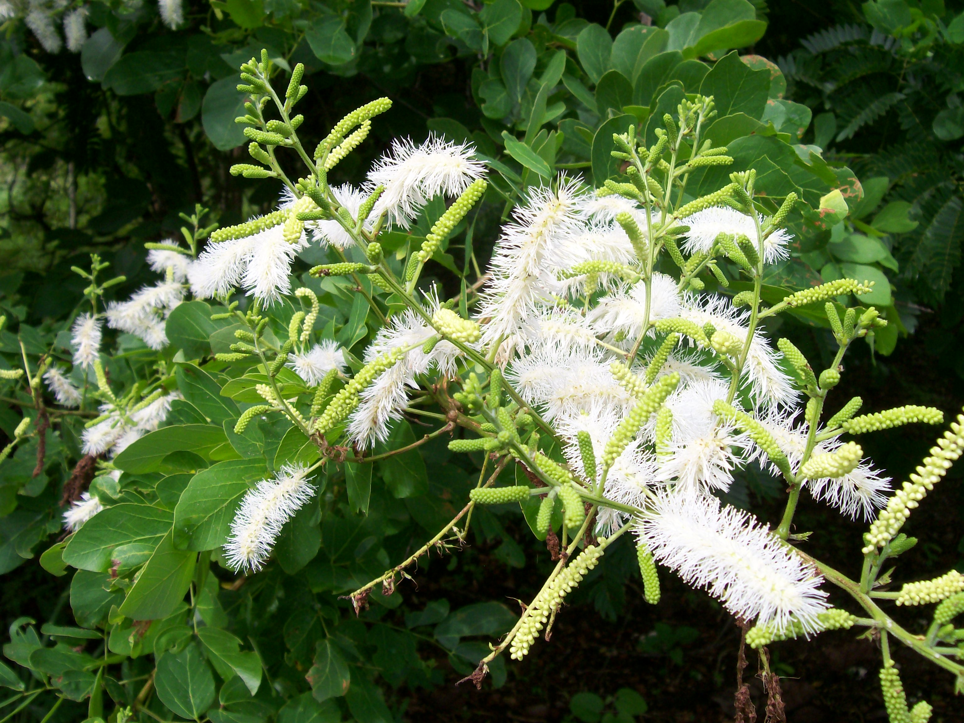 Flor do sabiazeiro